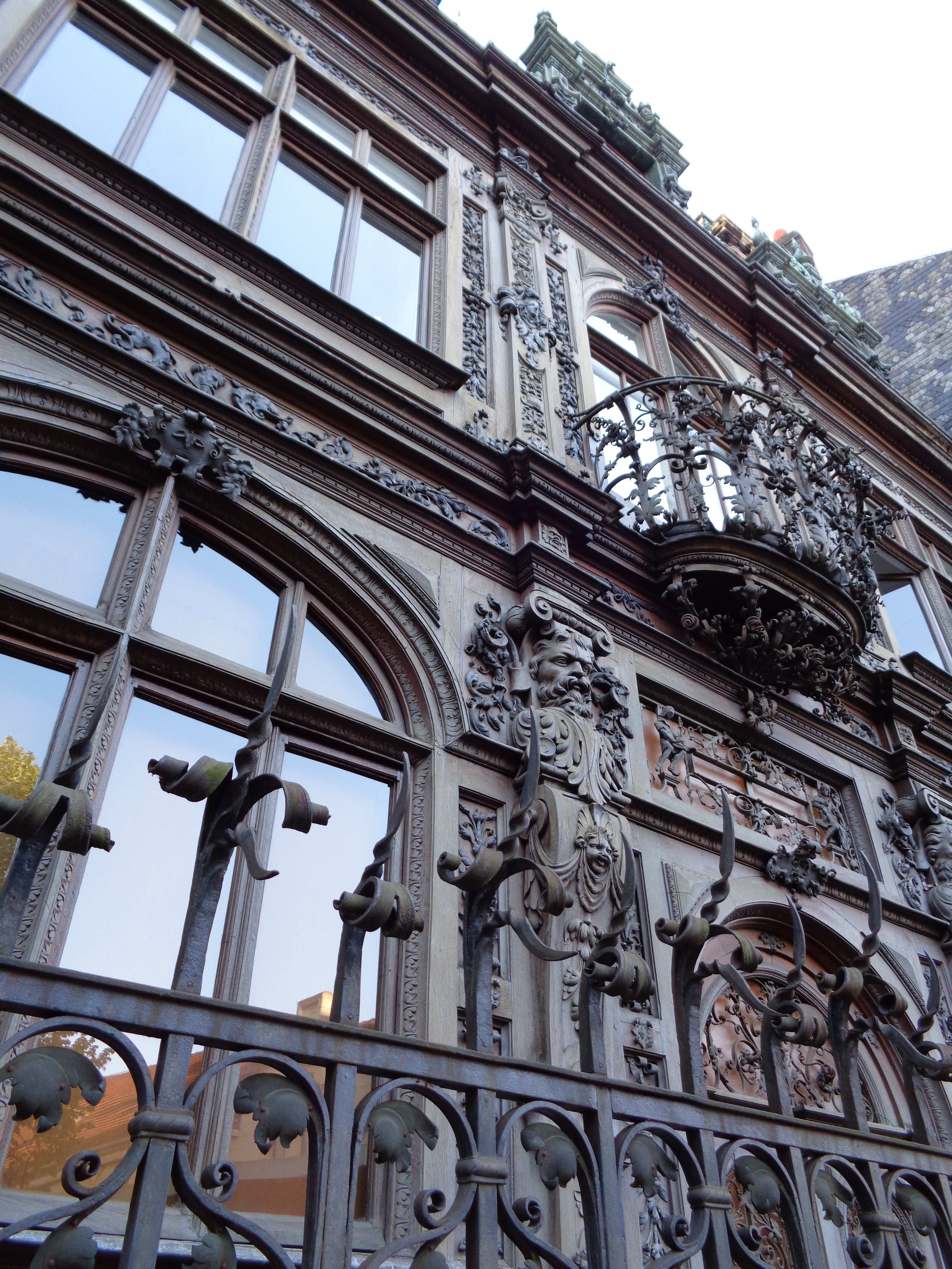 Maison Marrou, 1890, demeure de Ferdinand Marrou, 29, rue Verte à Rouen